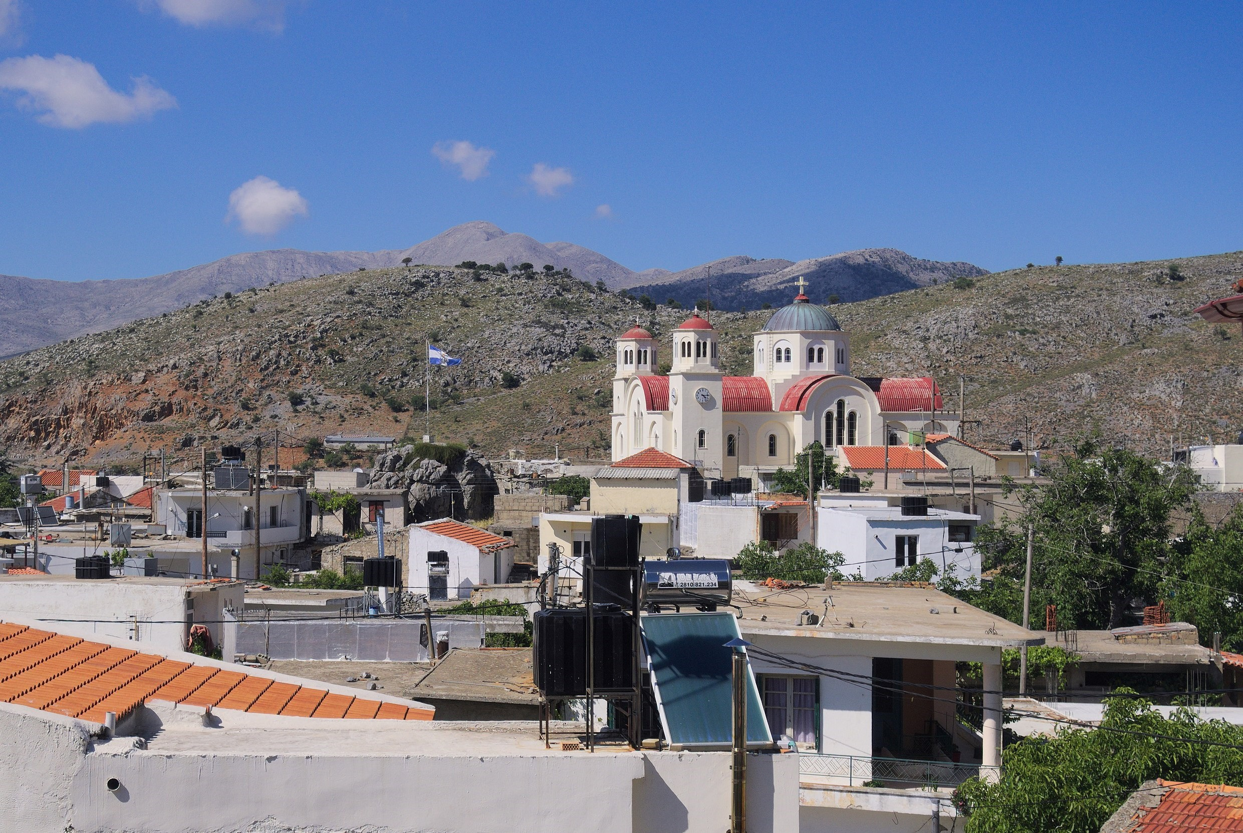 Ο ναός του Αγίου Γεωργίου, όπως φαίνεται από τον Άγιο Δημήτριο